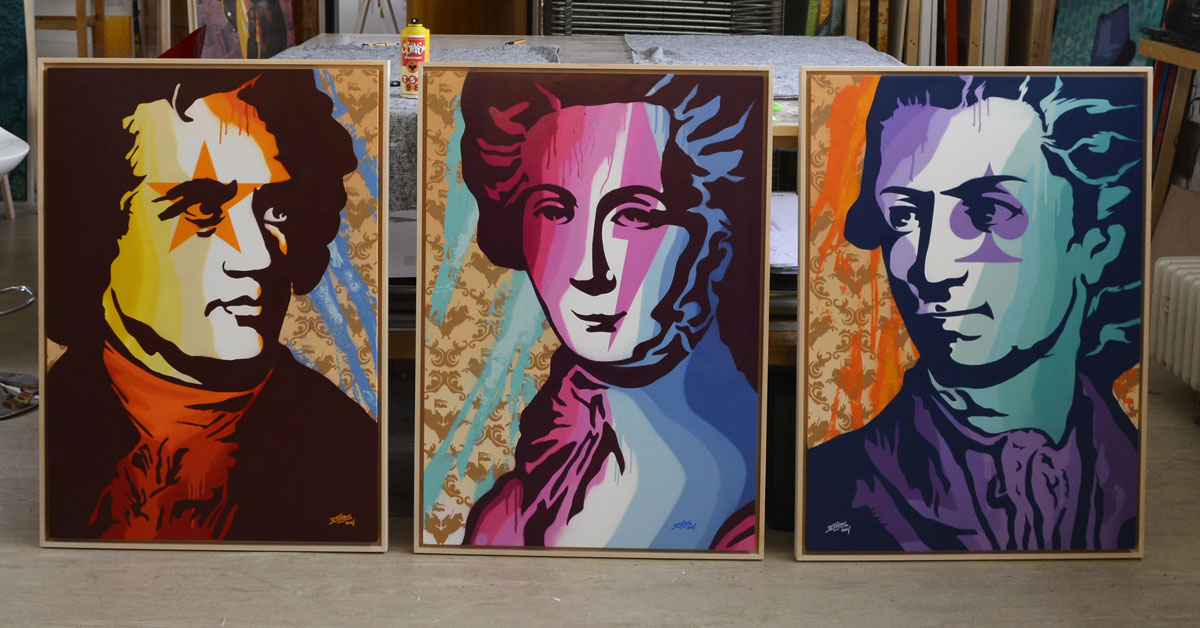 3Steps | Goethe Lotte Werther | Stadt-und Industriemuseum Wetzlar 2014